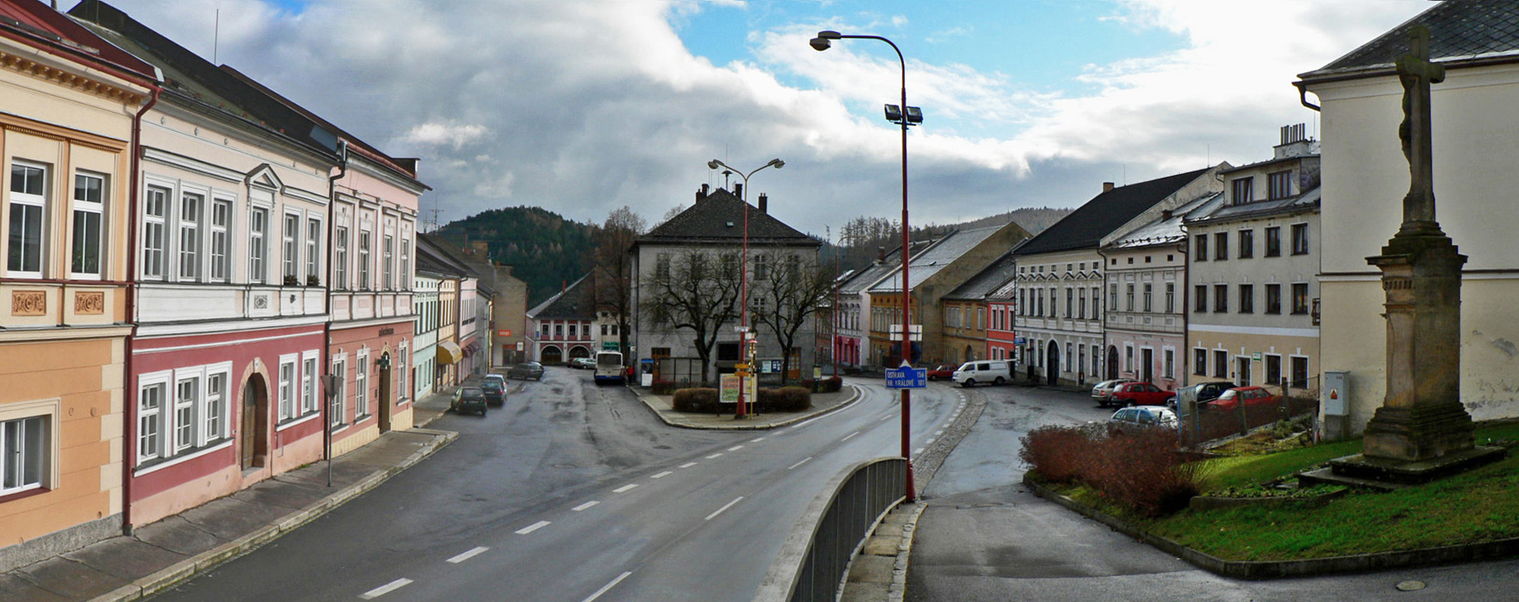 Náměstí ve Štítech od kostela